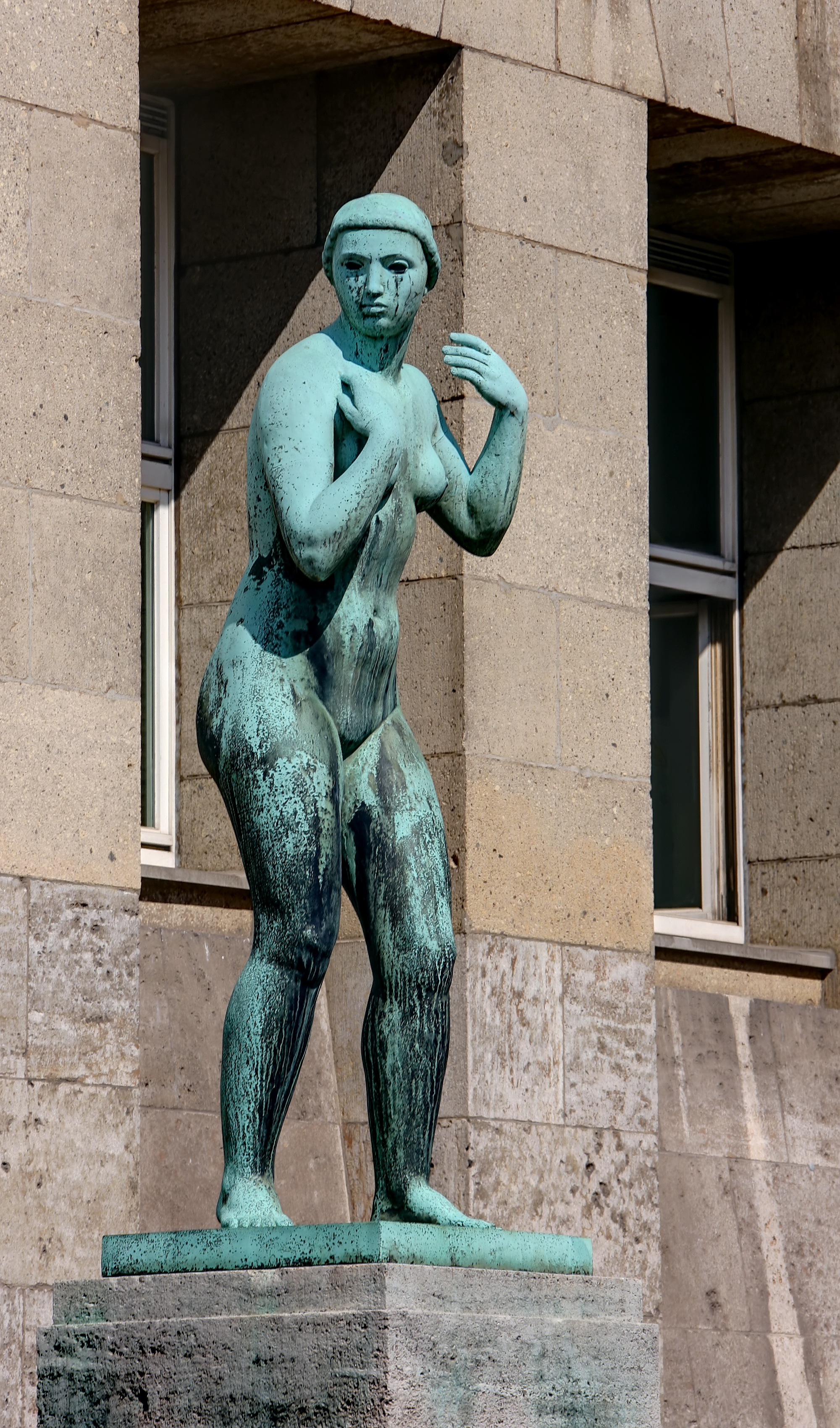 Weiblicher Akt